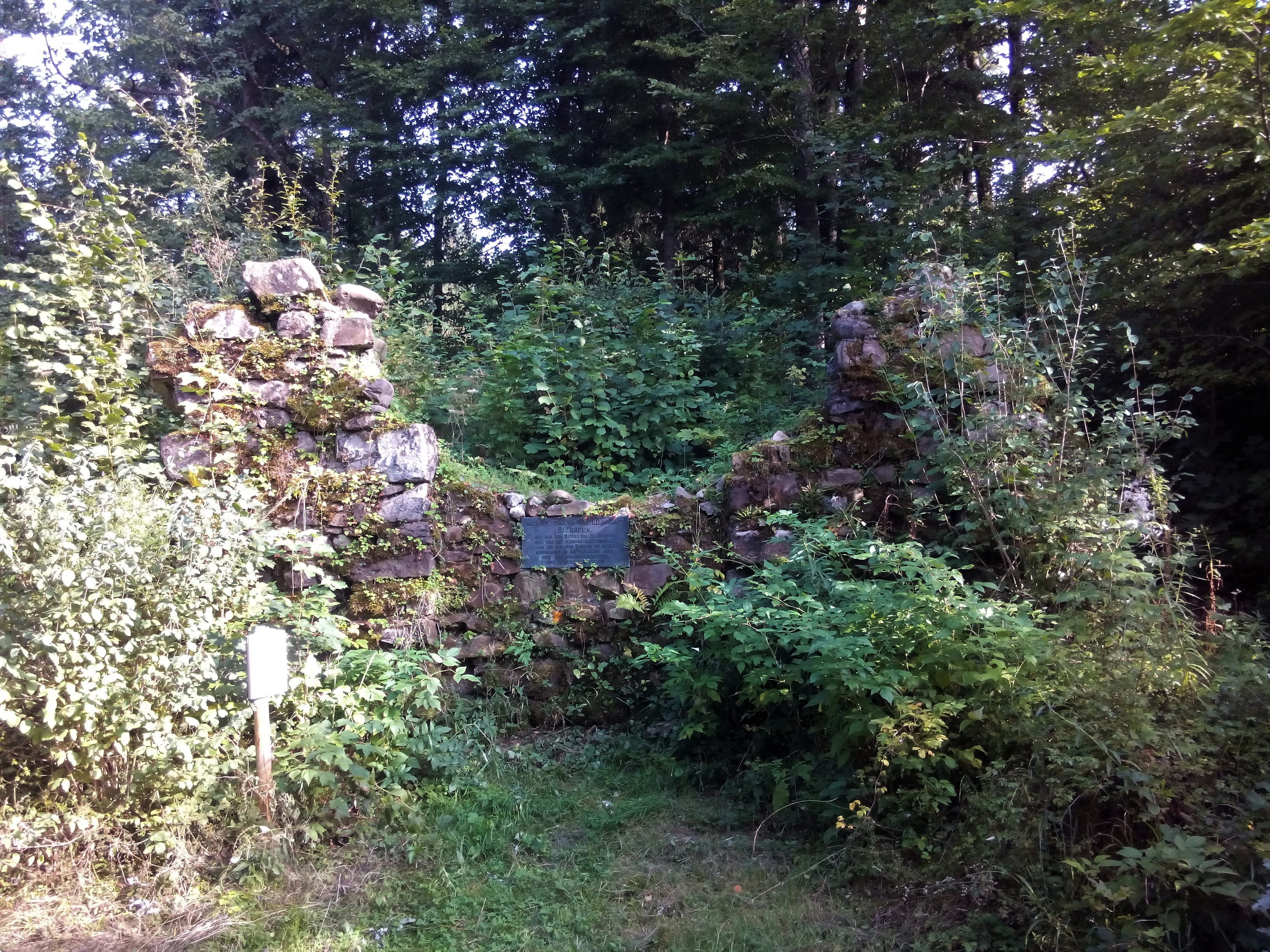 Burgruine Ellhofen in Weiler-Simmerberg